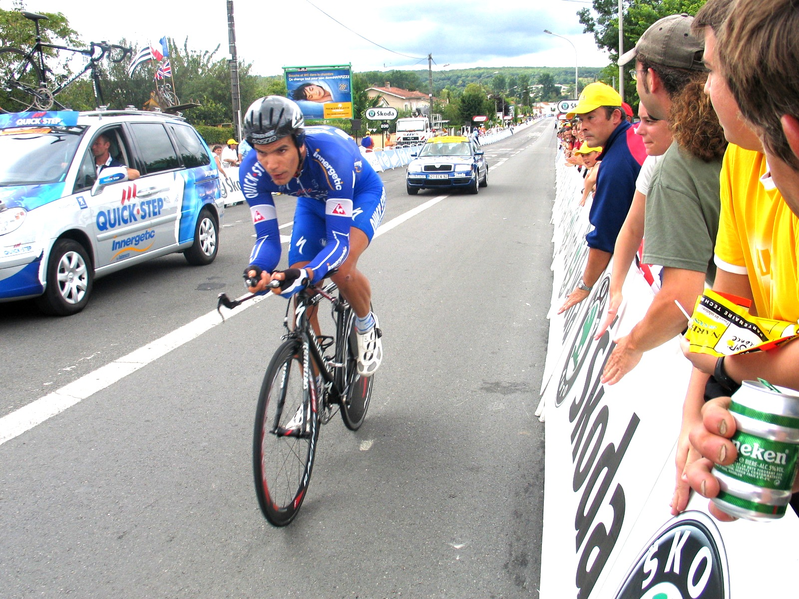 Gert Steegmans - Tour de France - tijdrit in Angoulême